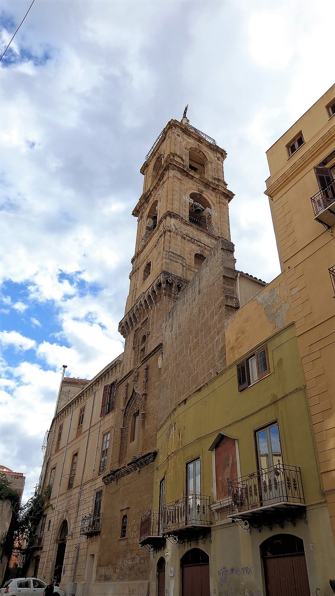 Interno chiesa